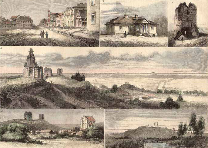 Беларуская (тарашкевіца): Наваградак (Navahradak). Краявіды